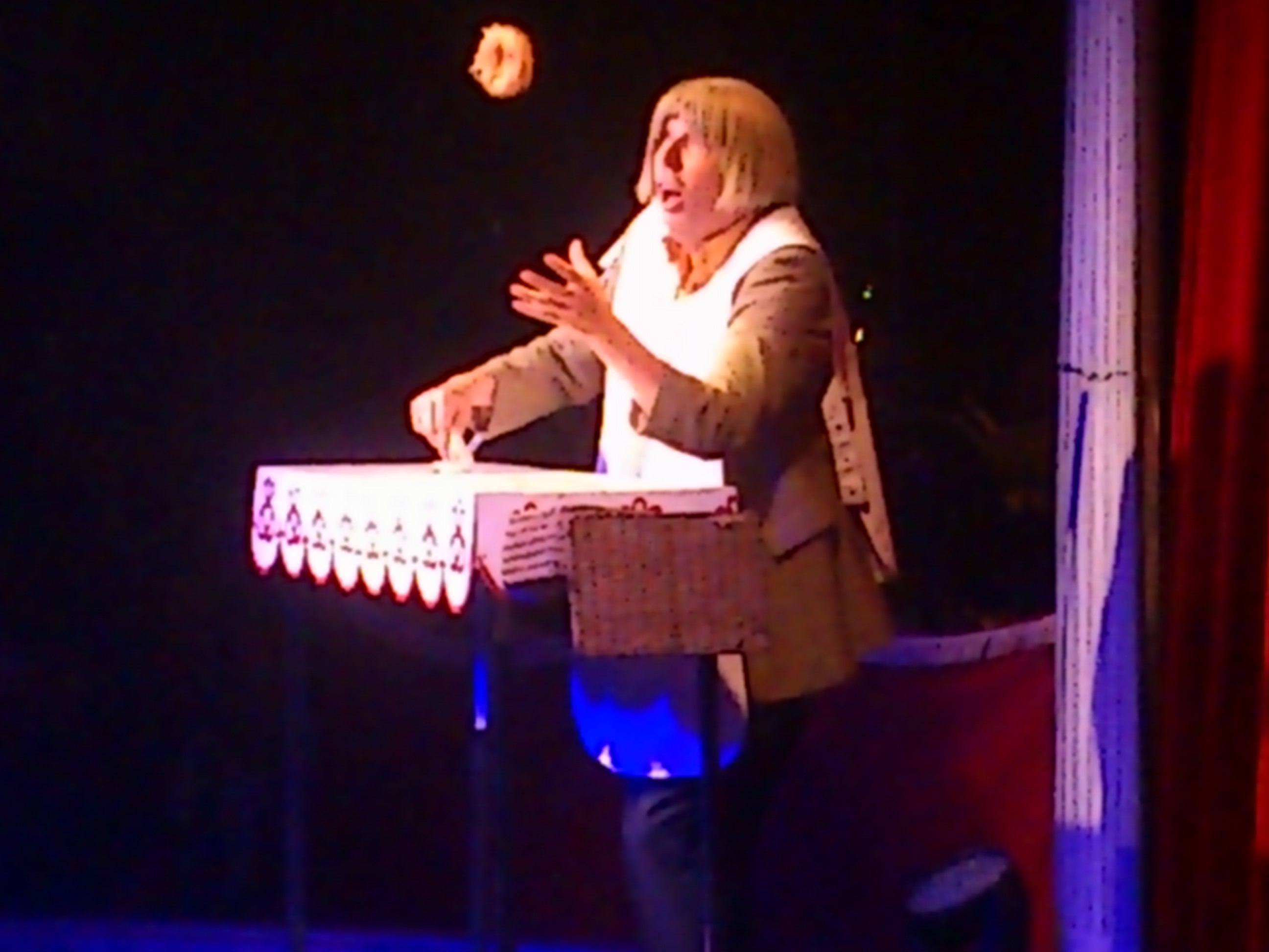 Et billede af Søren Østergaard i rollen som Bager Jørgen